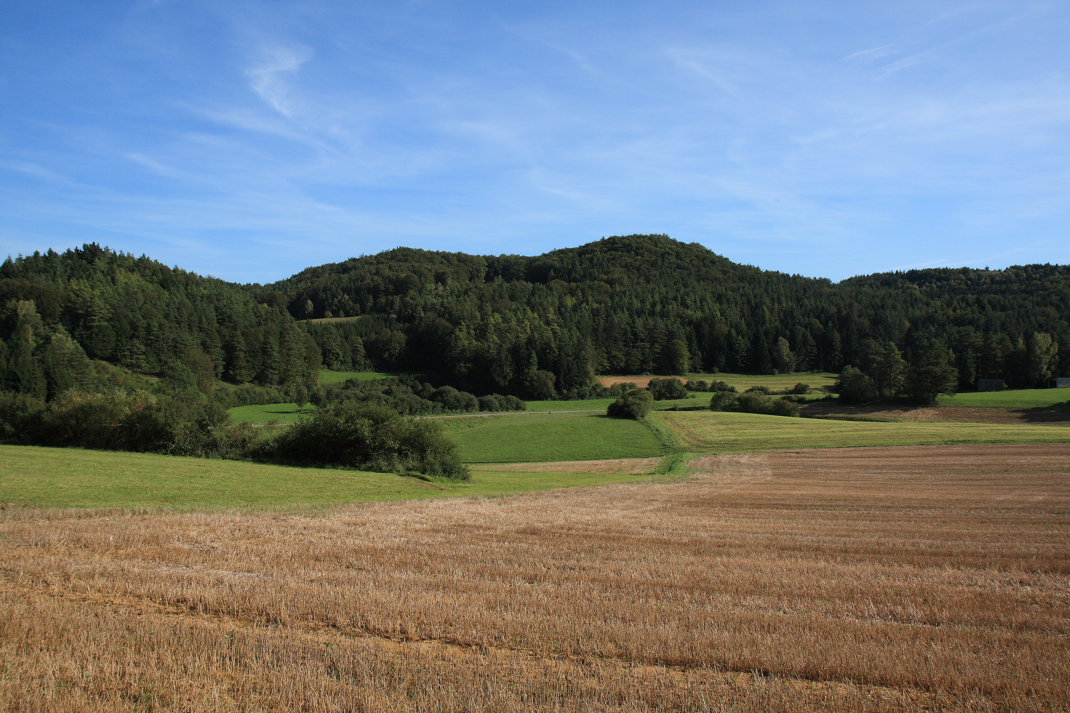 Burgstall Werdenstein - Ansicht des Bärenberges (Mitte) aus nordwestlicher Richtung